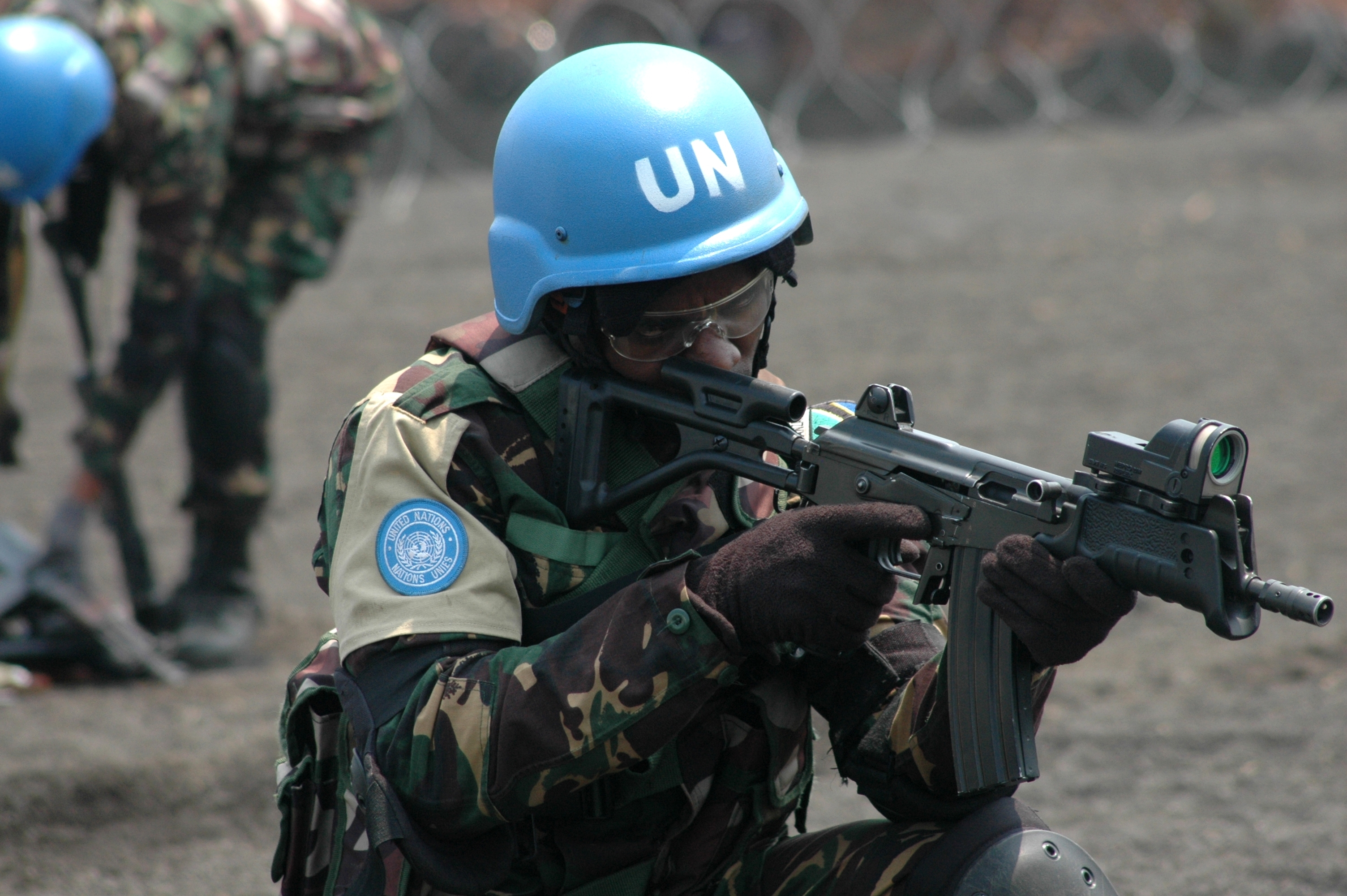 Des éléments de a Brigade d’intervention de la Force de la MONUSCO en pleine démonstration de techniques de combat. La Brigade a été mandatée par le Conseil de sécurité des Nations Unies pour neutraliser tous les groupes armés dans la partie est de la R. D. Congo. Photo MONUSCO/Clara Padovan